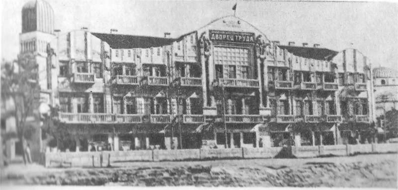 Дворец труда. 20 годы XX в. Гостиница Крым.